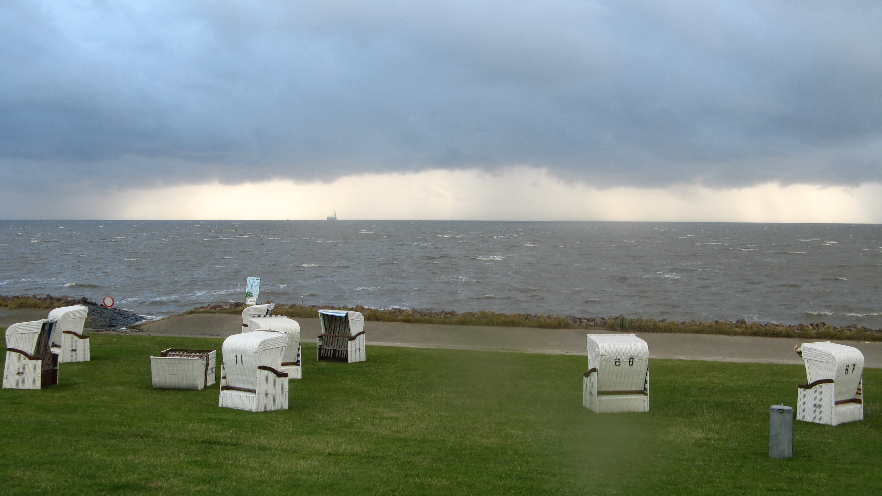 Beach in Friedrichskoog-Spitze